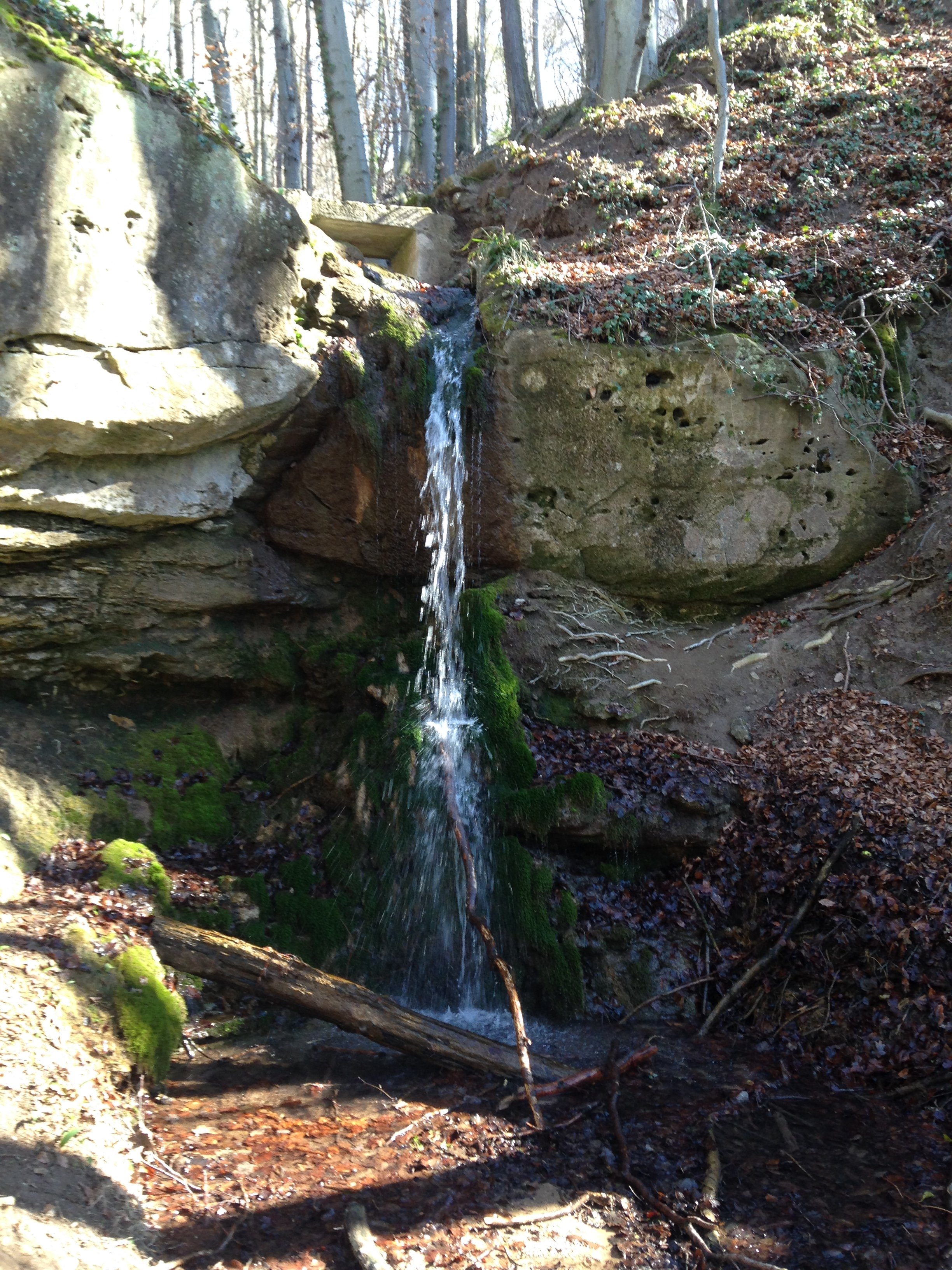 Wasserfall des Grunbach, Remshalden, Baden-Württemberg